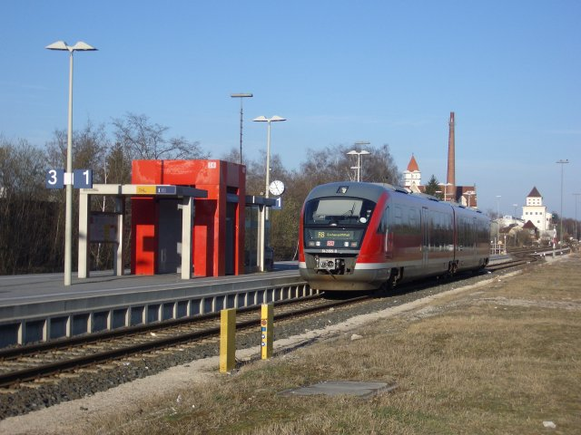 Triebwagen der Baureihe 642 im Nürnberg Nordostbahnhof.